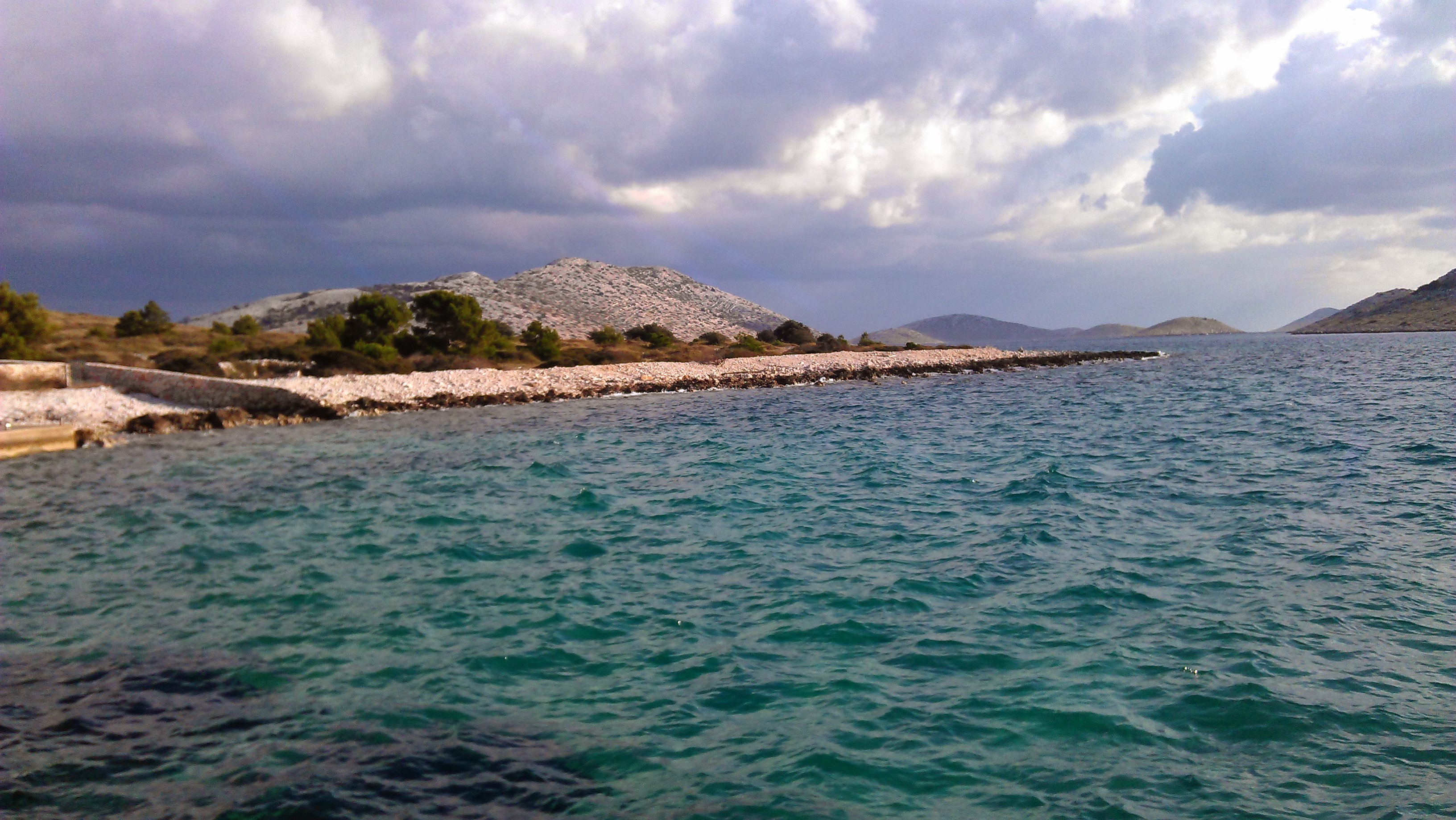 otok Ravni Žakan np kornati